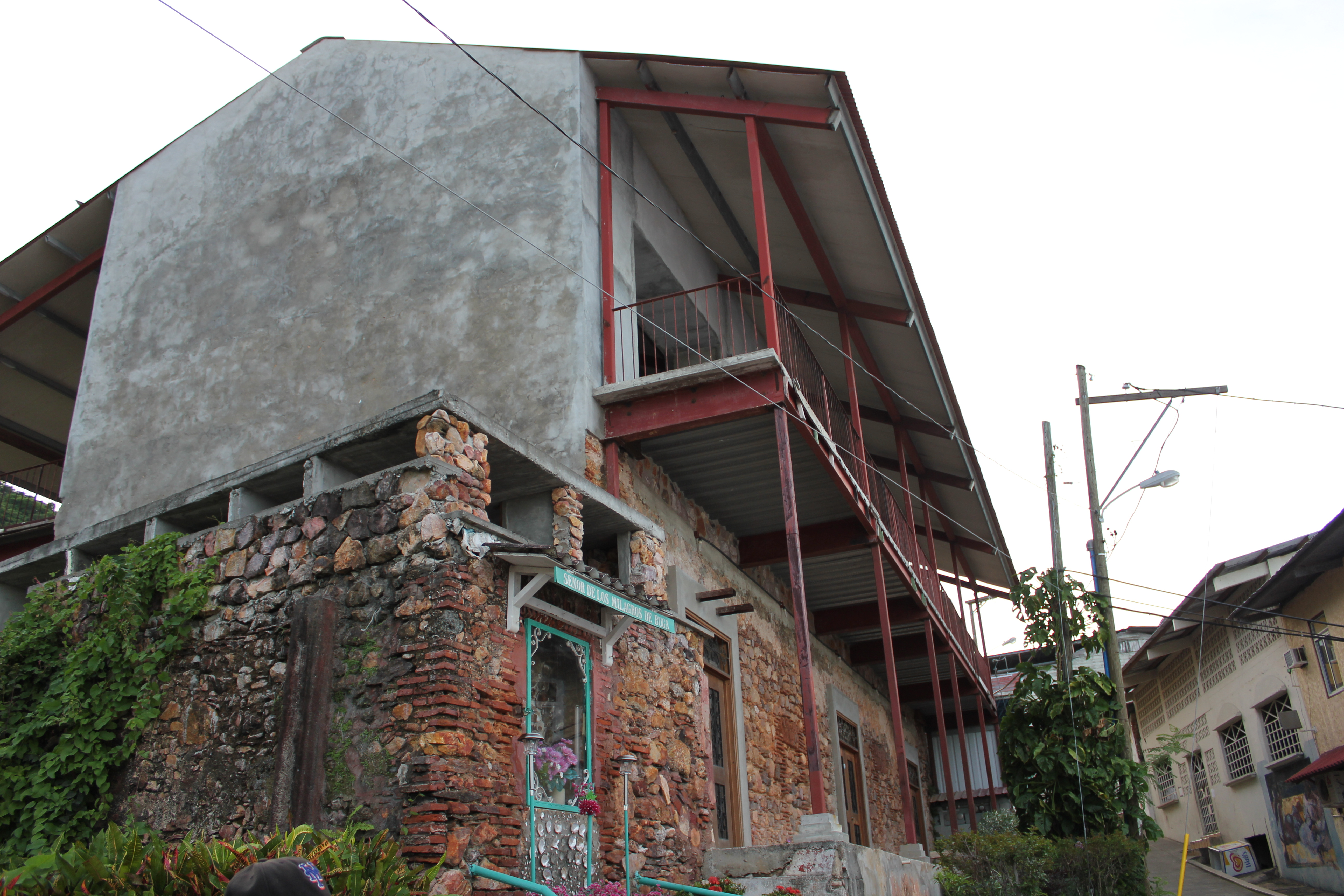 Casa Monasterio de Hernando de Luque, Ley 6 del 13 de marzode 2012 que declara esta casa como parte del Conjunto Monumental Histórico de Taboga. Panamá.